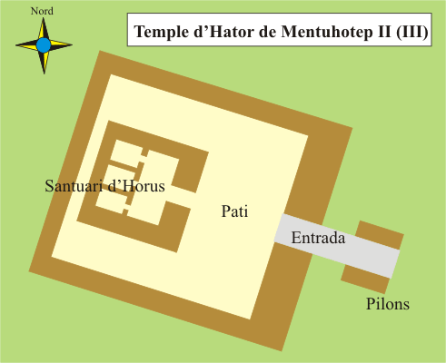 Plànol del temple d'Horus construit per Mentuhotep II (III) a Tebes